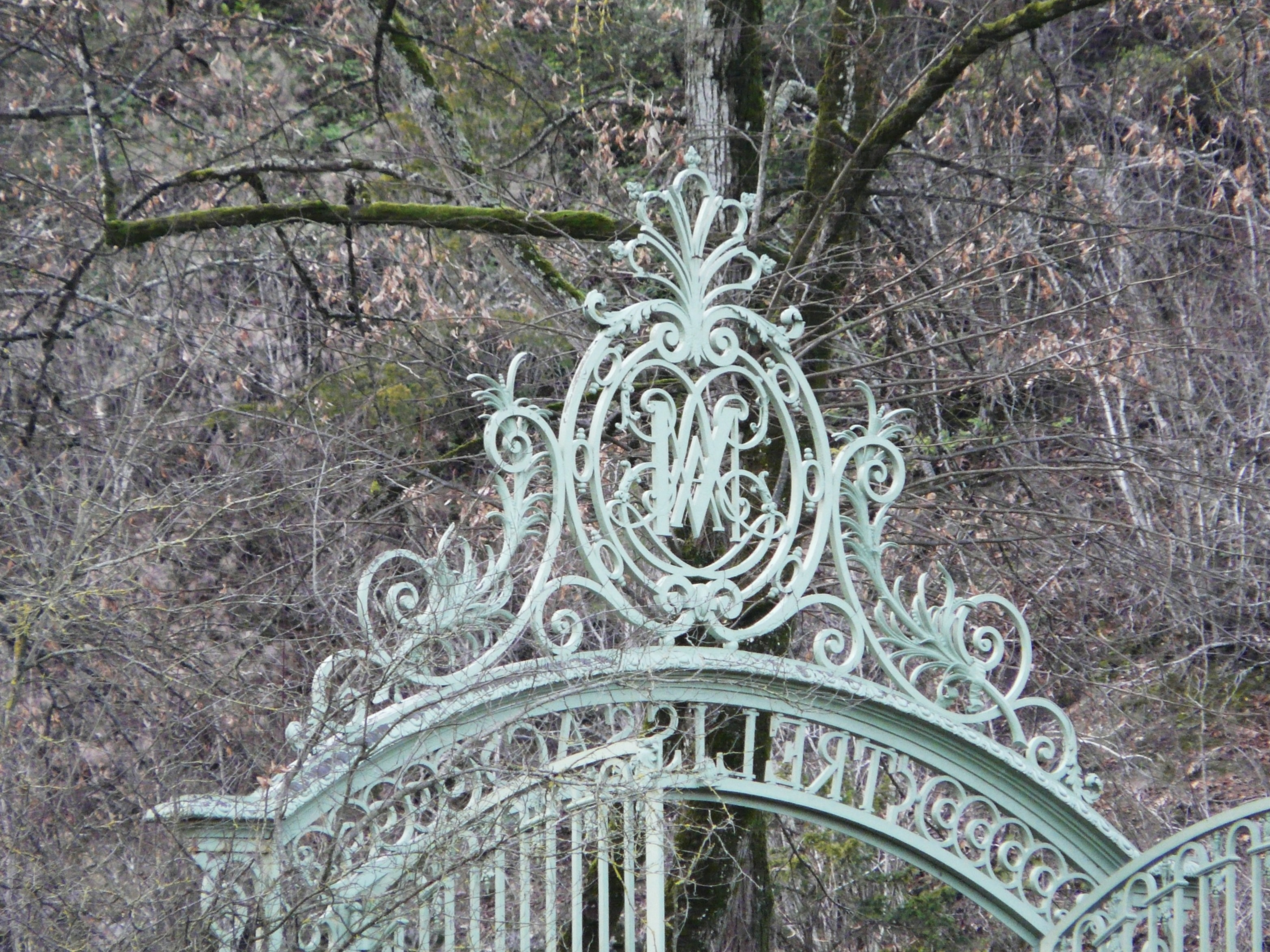 La grille du portail du château Magne, Trélissac, Dordogne, France.